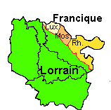 Icône pour représenter les langues sur le portail de Lorraine